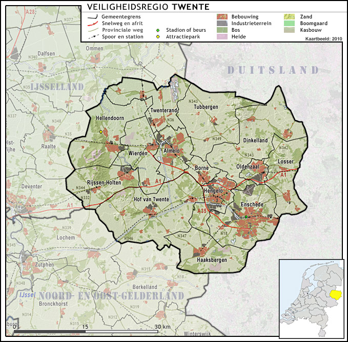 Veiligheidsregio Twente, met indeling van gemeenten (2010) en impressie van het landschap. Door Jan-Willem van Aalst, samengesteld uit publiek beschikbare geo-data: Referentie-ondergrond (kustlijn, steden, wegen) gerasterd uit de OpenStreet Map OSM. ( Inhoud is beschikbaar onder de Creative Commons Attribution-ShareAlike 3.0 license. Referentie-ondergrond op water bewerkt vanuit Gebruik is vrij met bronvermelding NLR en ESA. Vectorgrenzen van gemeenten en regio's vrij ter beschikking gesteld met dank aan cartografen van brandweerregio's Hollands-Midden en IJsselland; gerasterd in Photoshop. Hoogte-aanduidingen (reliëf) gerasterd uit de AHN Viewer ( gebruik is vrij met bronvermelding (c) AHN, Overige kenmerken op de kaart: eigen tekenwerk van Jan-Willem van Aalst, op basis van gerasterde gemeentegrenzen.